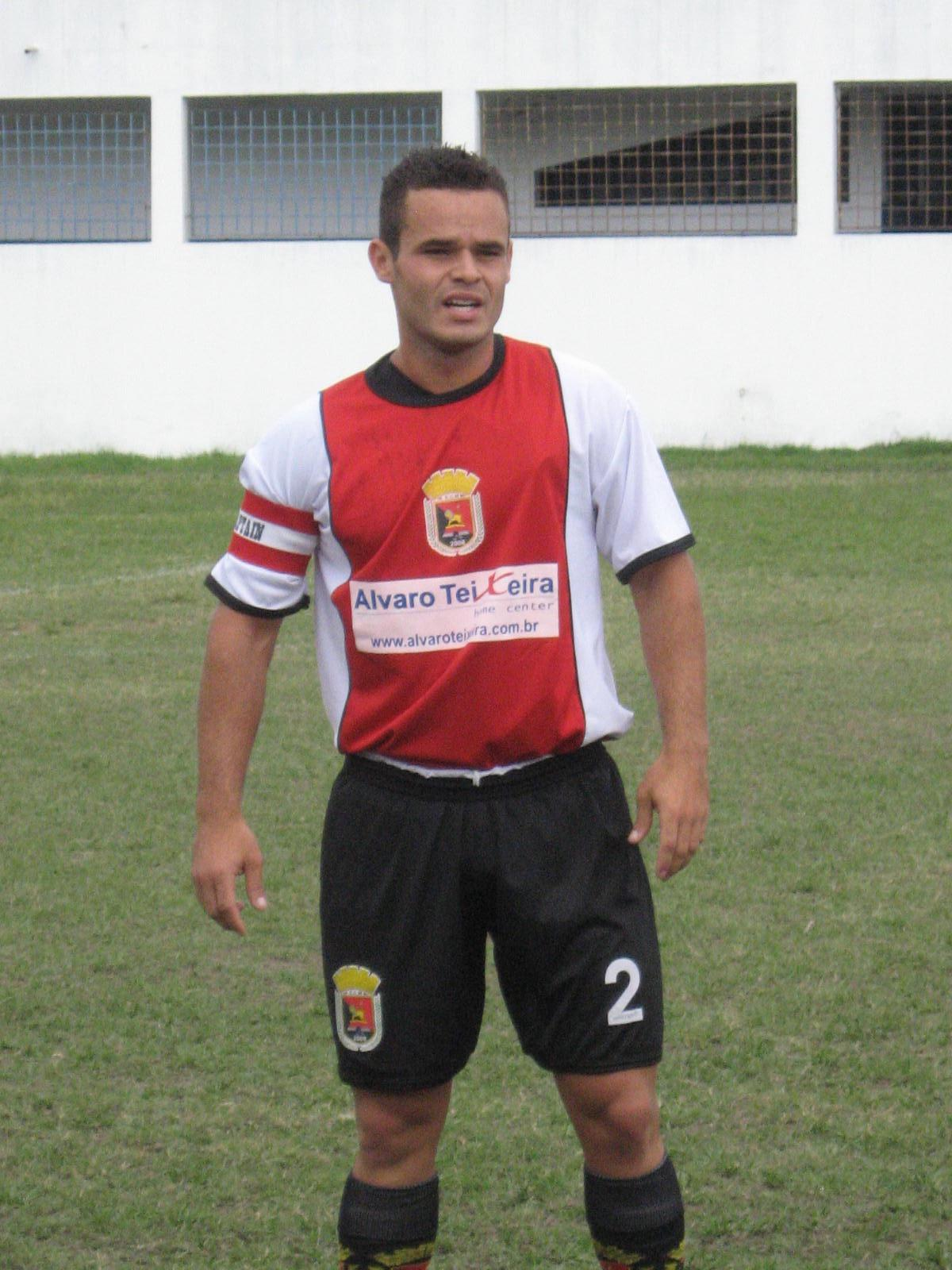 Atleta ostentando o uniforme do Esporte Clube Marinho em 2009